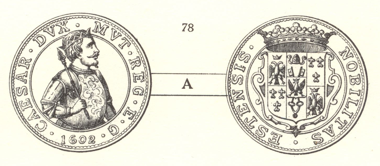 Modena, duca Cesare d'Este (1597-1628) AR Tallero: CAESAR • DVX • MVT • REG • E • C • attorno al busto loricato di Cesare volto a destra con scettro nella mano destra. In esergo: millesimo NOBILITAS • ESTENSIS e stella; intorno a stemma estense coronato.